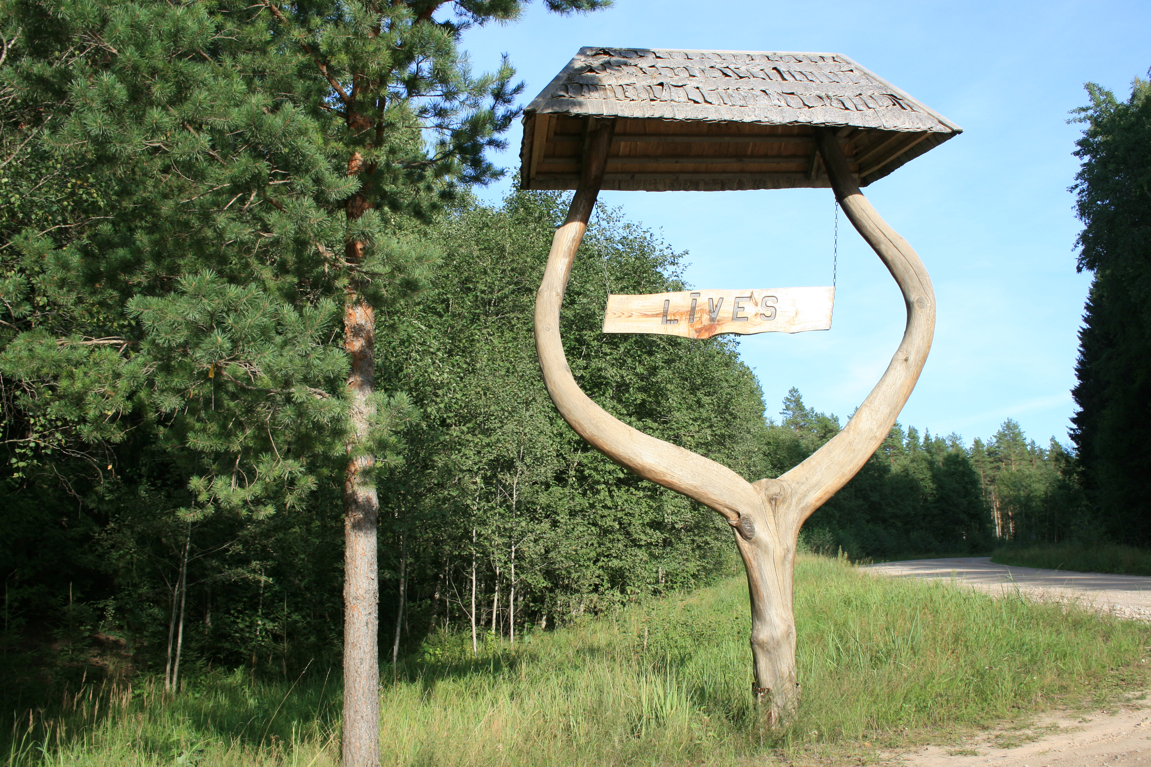 Līves